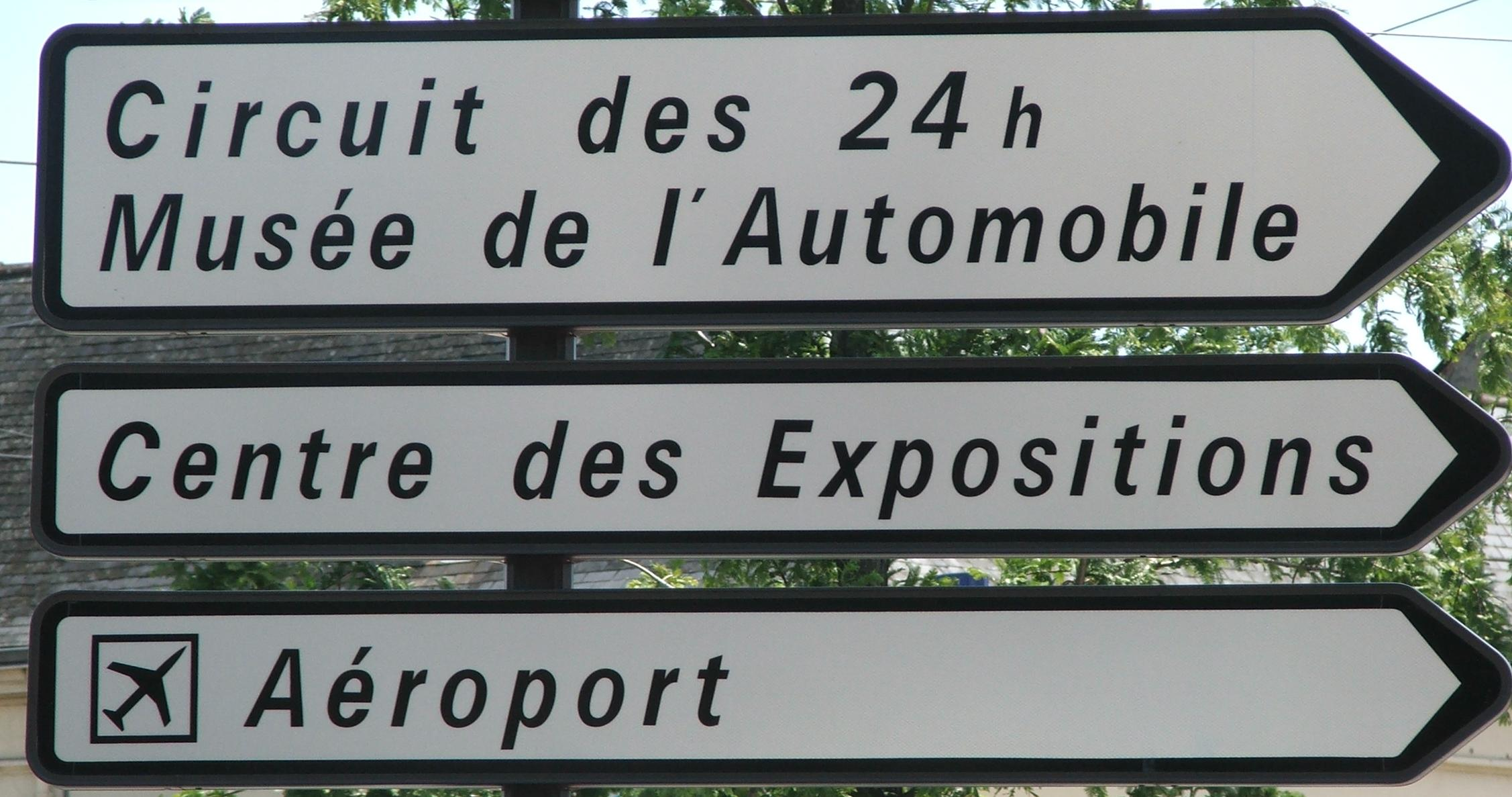 Signalisation de l'aéroport/drome du Mans depuis Pontlieue.